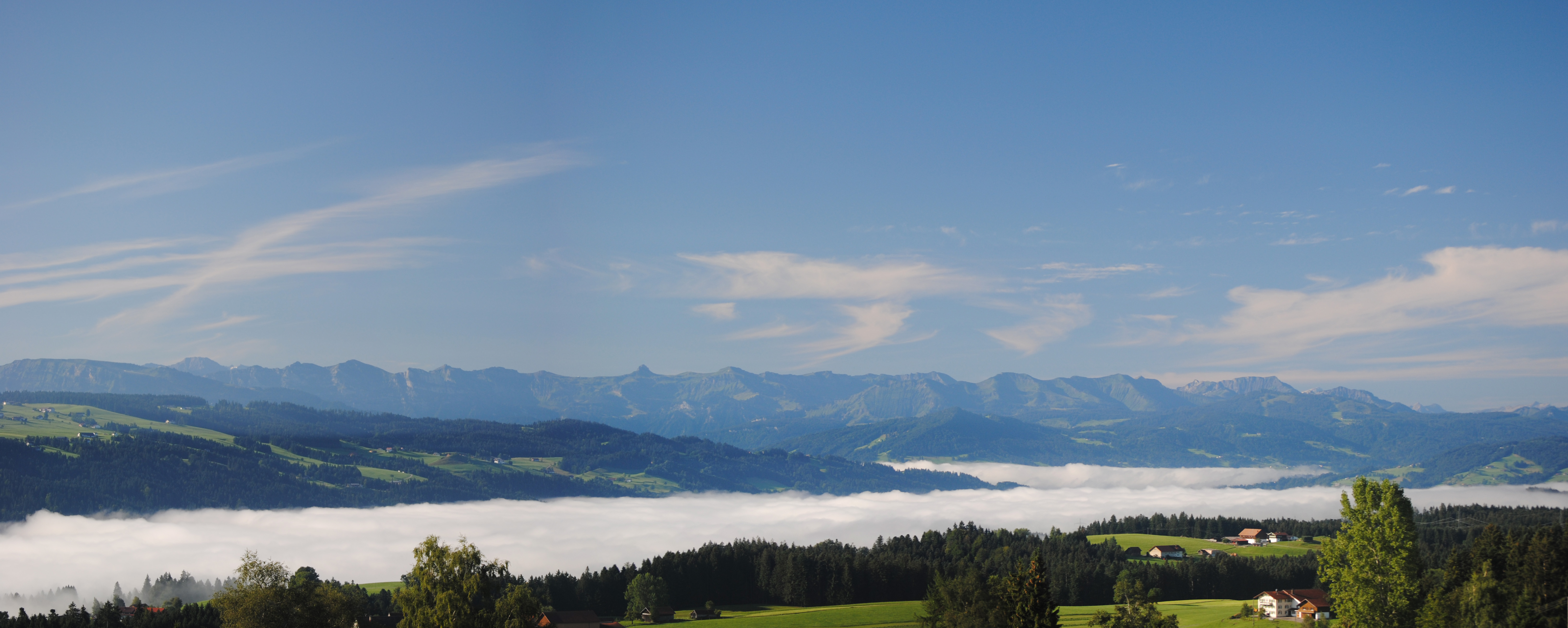 Blick von der Queralpenstraße